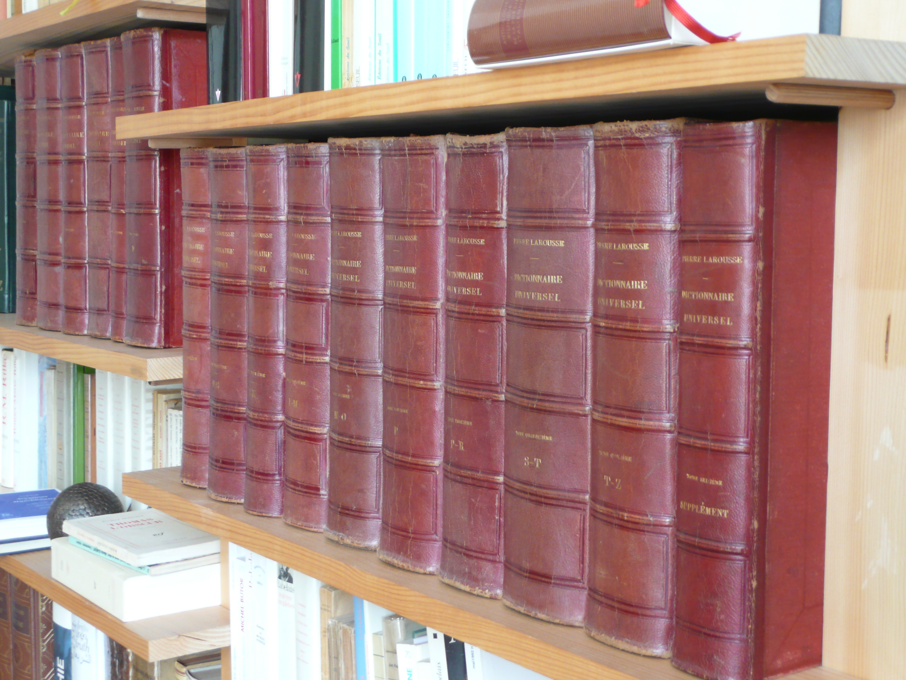 Grand Larousse du XIXe siècle, dictionnaire encyclopédique de Pierre Larousse en 15 volumes publiés de 1866 à 1876, suivis de 2 suppléments en 1877 et 1878 (ici, manque le 2ème supplément).